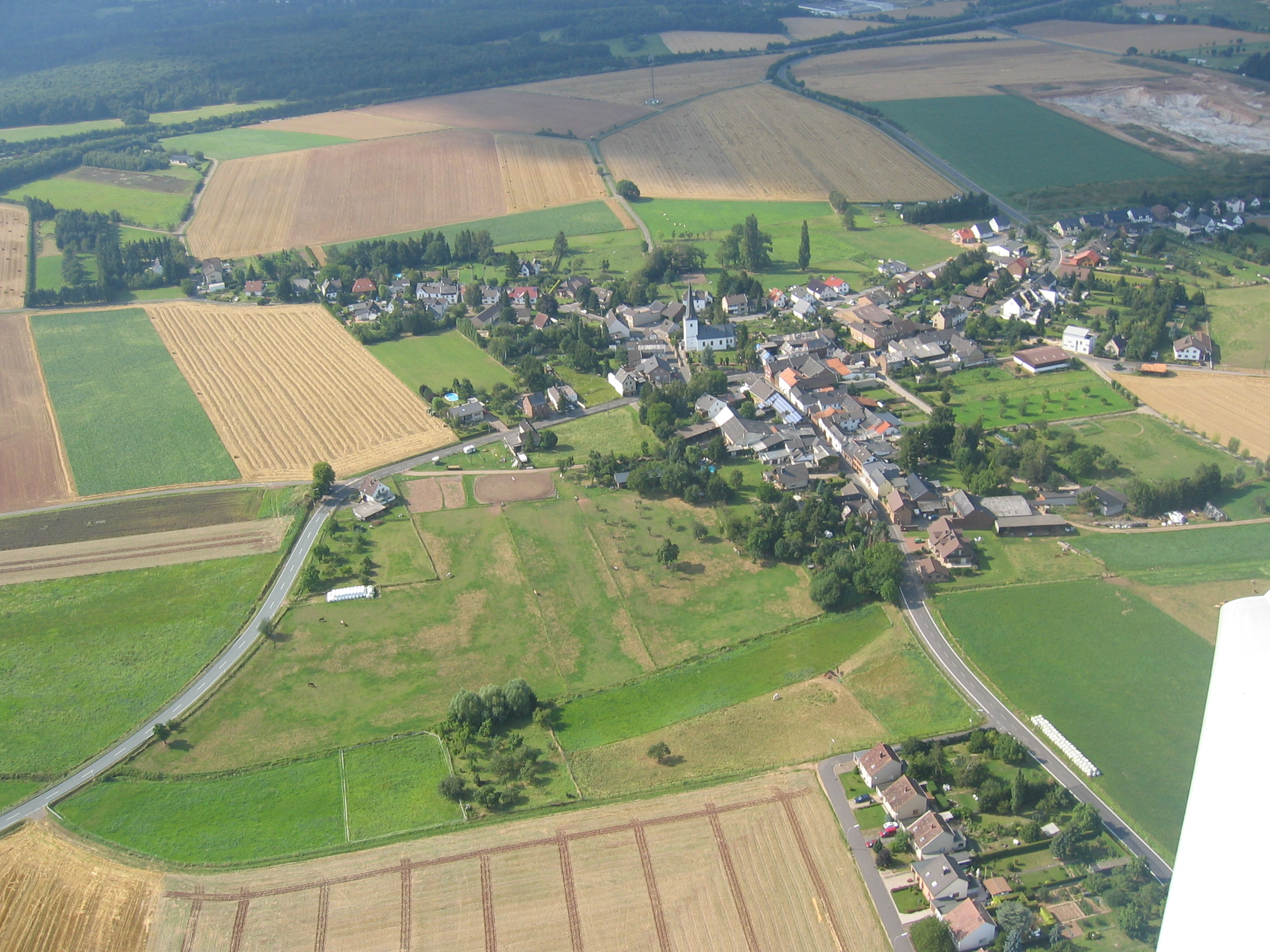 Luftbild des Ortes Lessenich